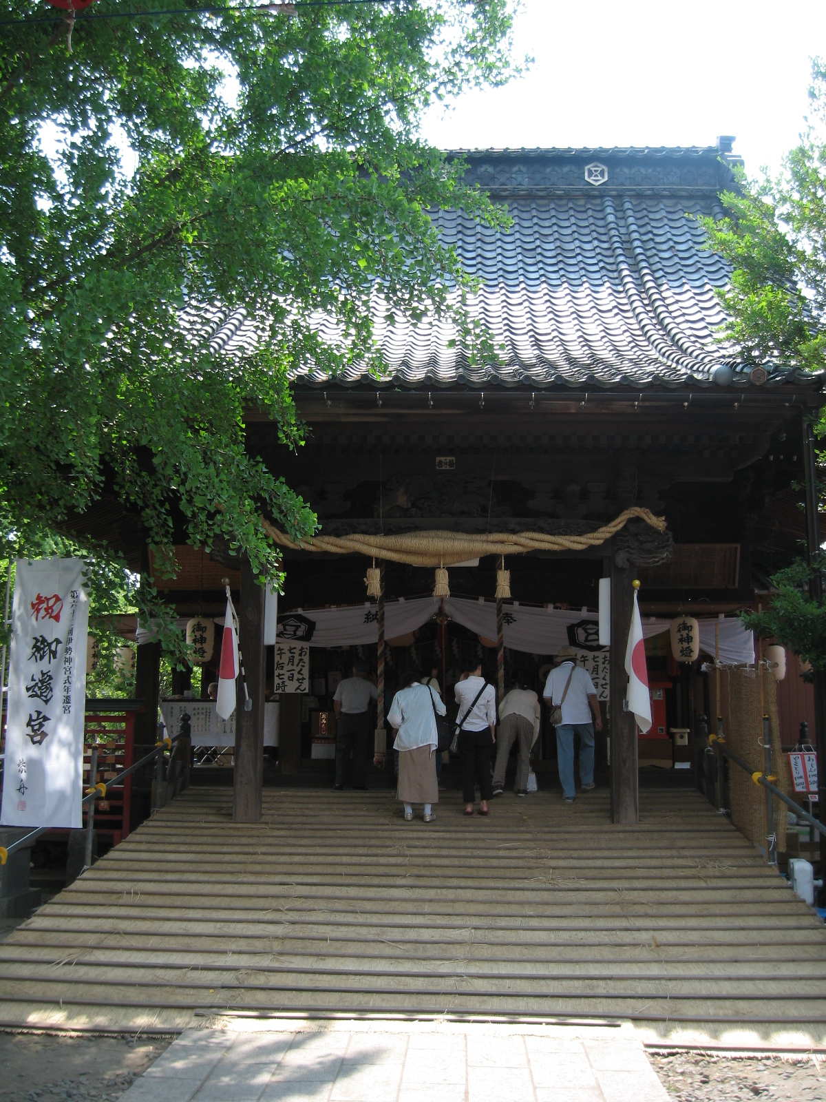 新潟市中央区。蒲原神社。